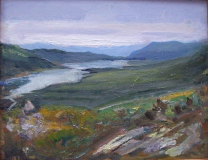 Norwegian: Motiv Fra Sjodalentitle QS:P1476,no:"Motiv Fra Sjodalen" label QS:Lno,"Motiv Fra Sjodalen"